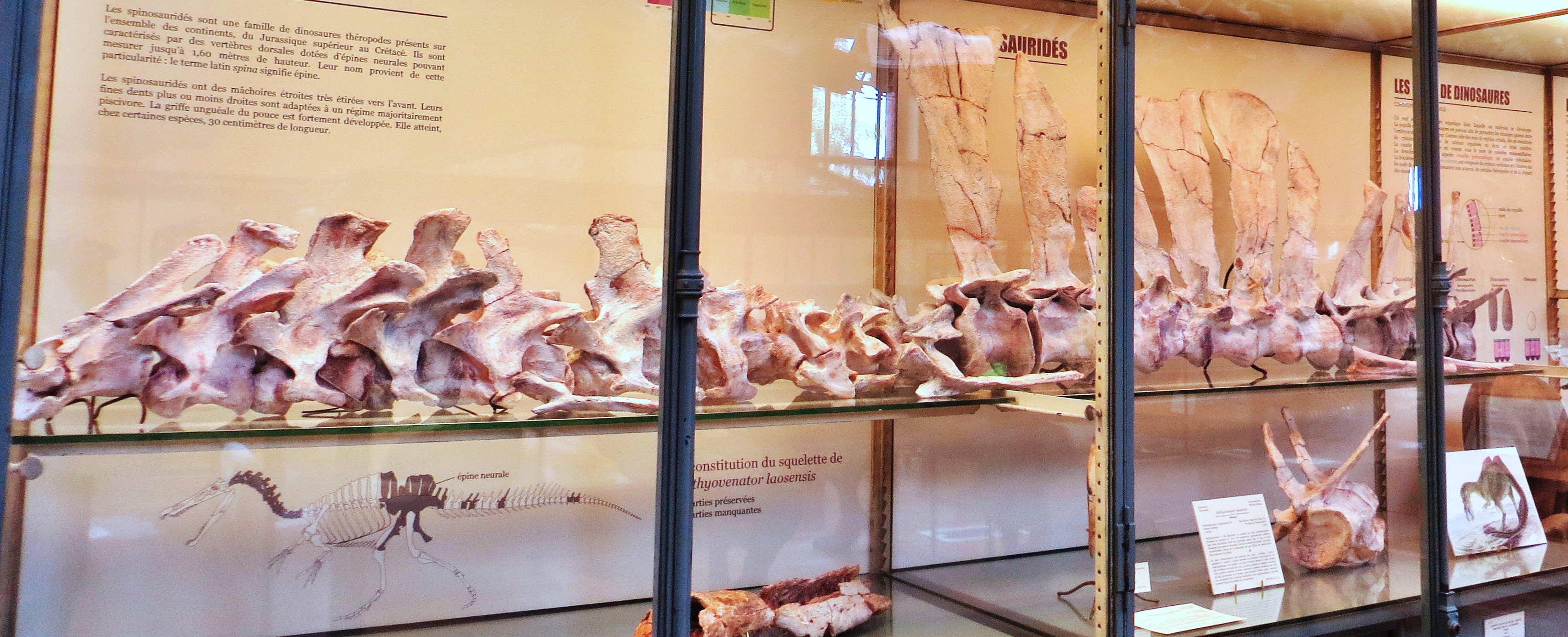 Fossil of Ichthyovenator - theropod dinosaur